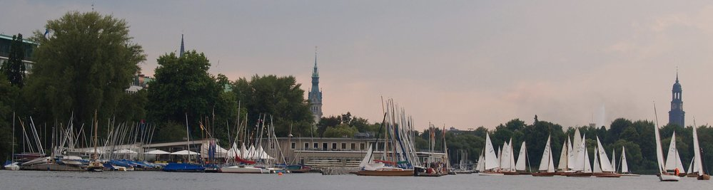 Warten auf den Start vor dem Steg des Hamburger Segel-Clubs